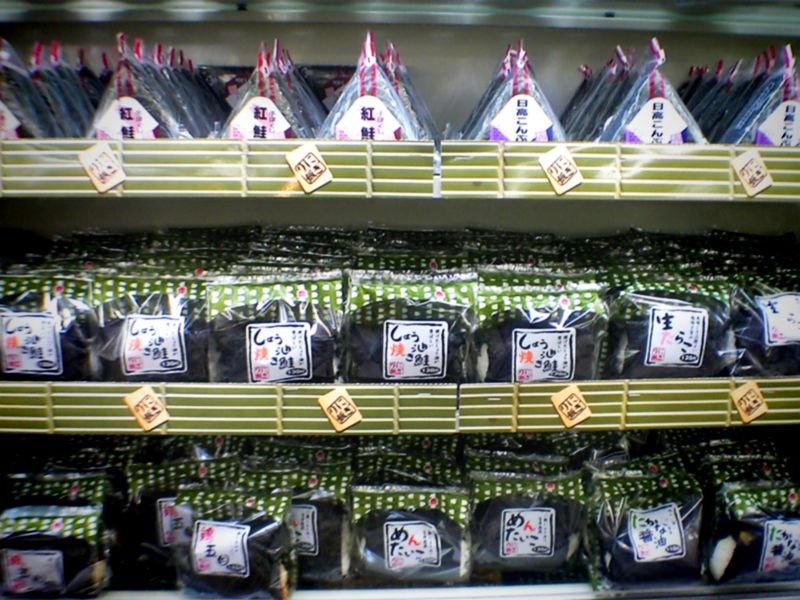 すごい品揃え